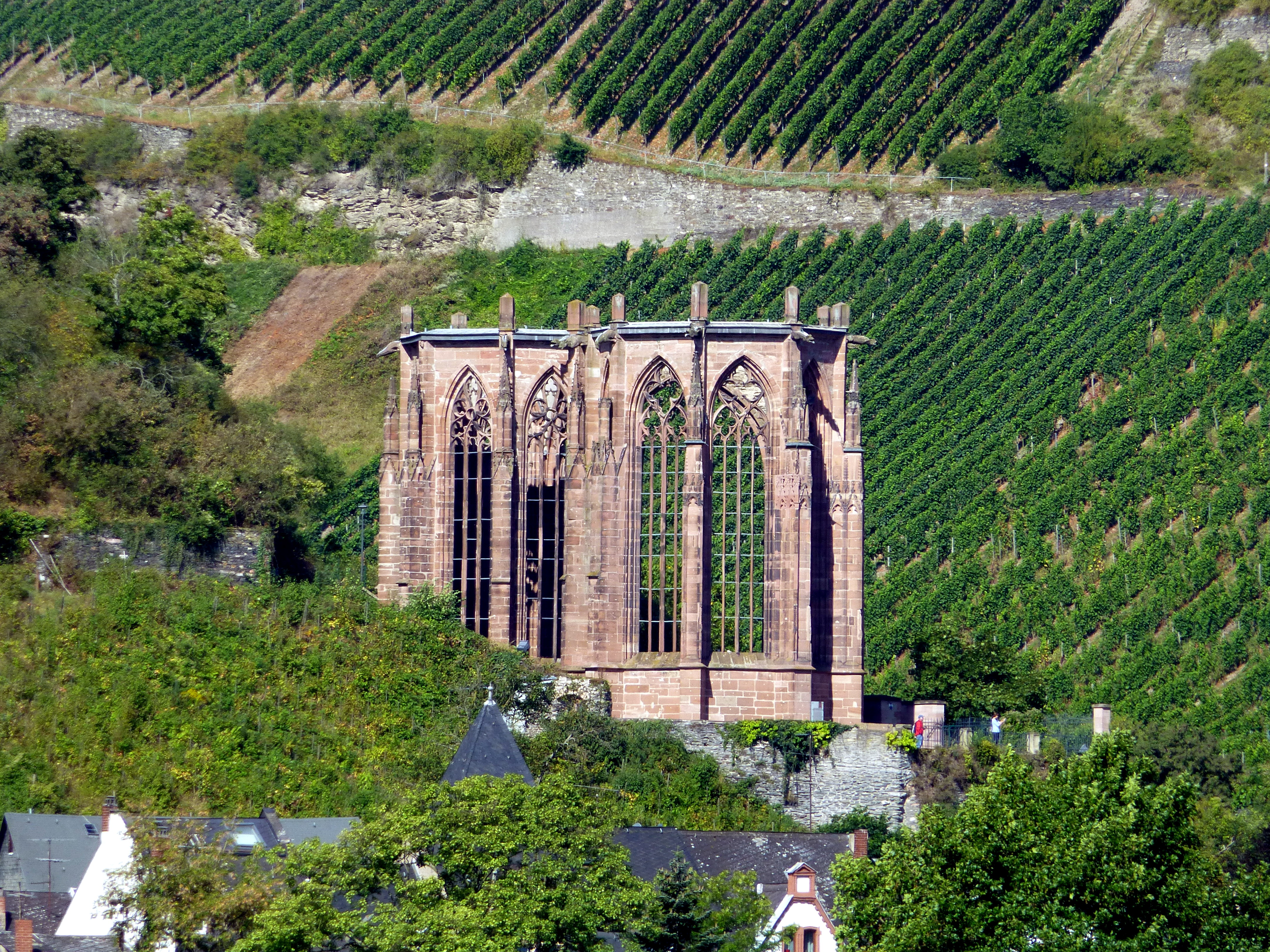 Bacharach – Die unvollendete Wernerkapelle